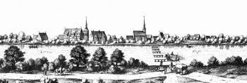 Public Domain 1564